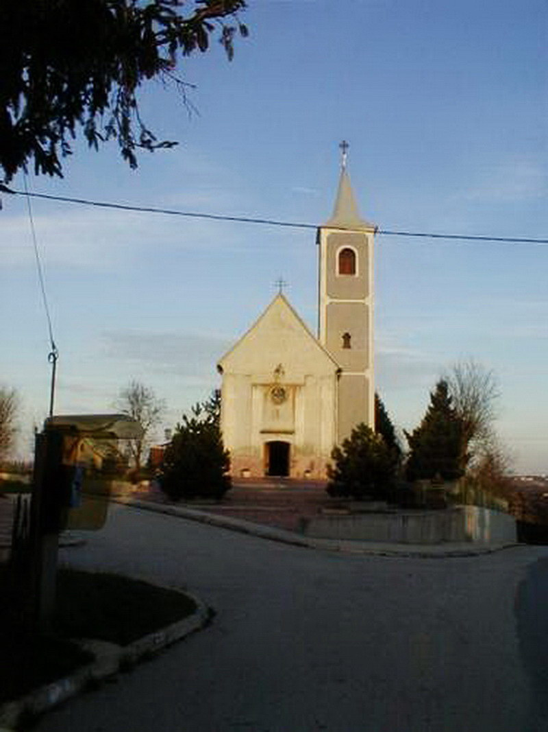 Lovrečka Varoš - Church